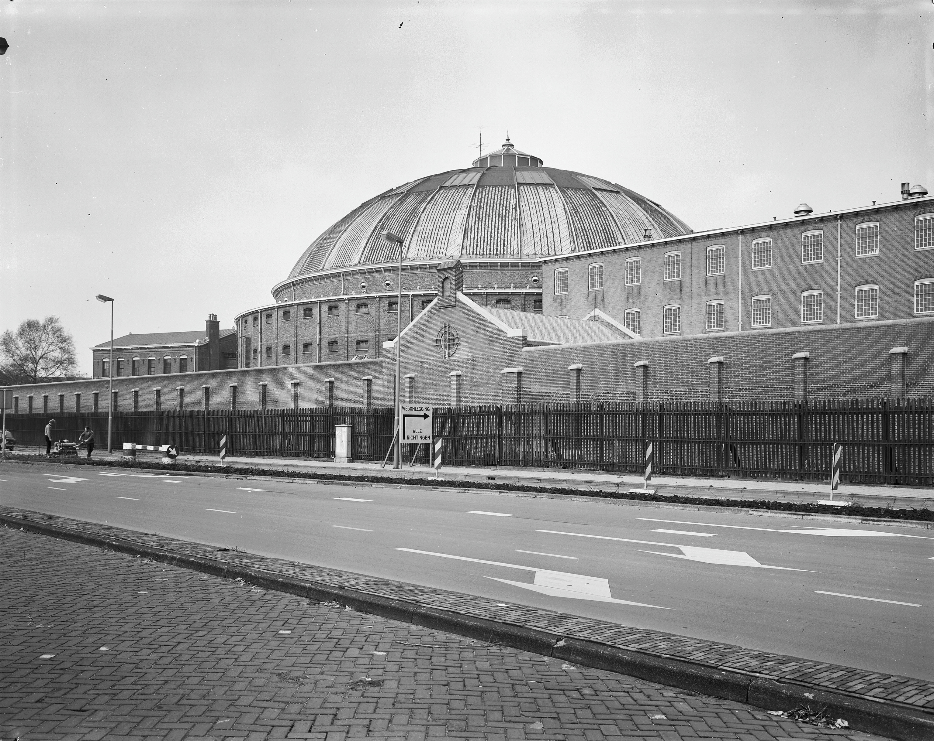 Gevangenis: exterieur